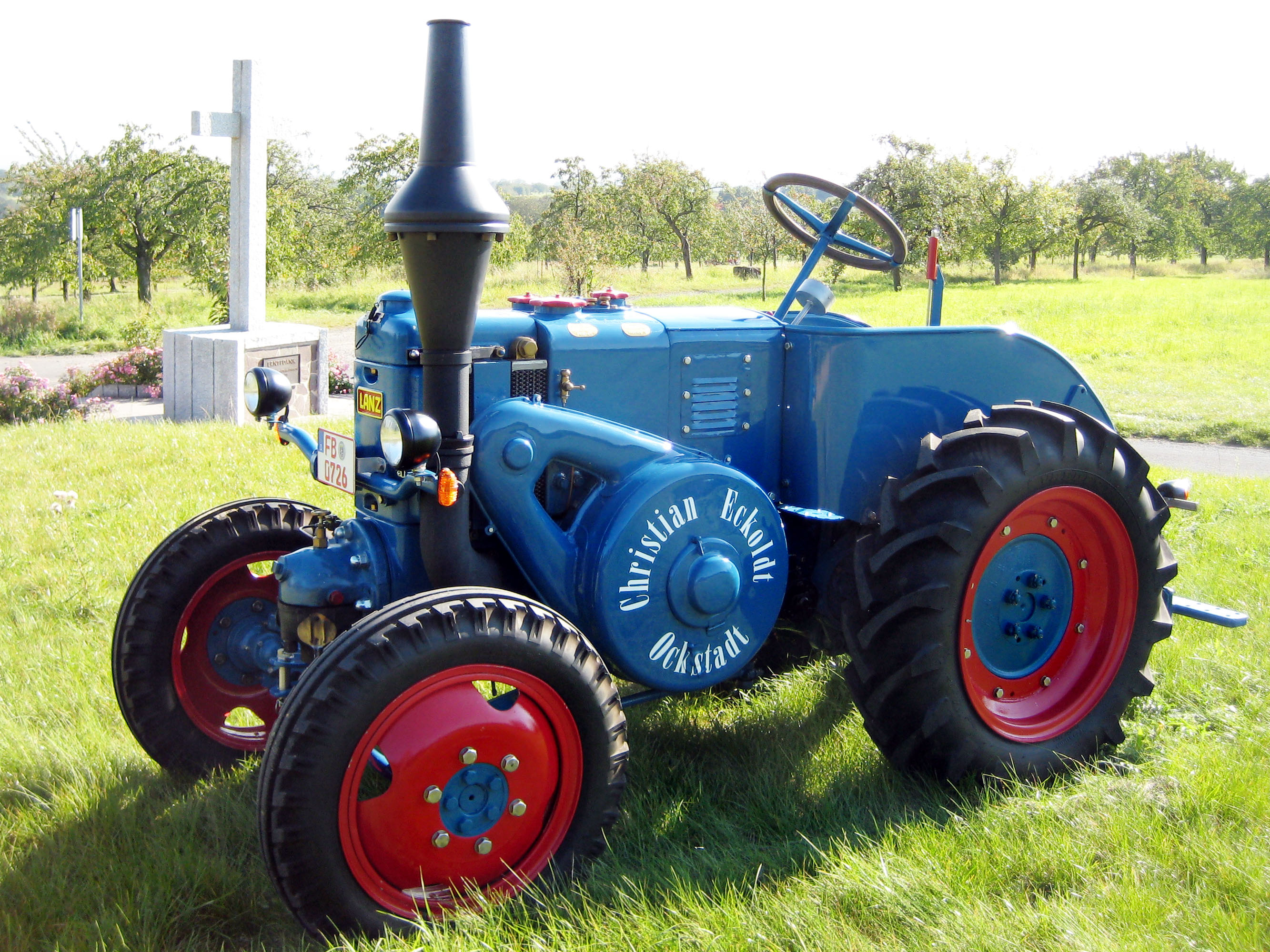 Lanz Bulldog D7506/3, Baujahr 1939, 25 PS, Hubraum: 4,7 Liter, Vielstoffmotor, ventilloser Lanz-Einzylinder-Zweitakt-Glühkopf-Mitteldruckmotor, „Mein Lanz“, Lanz-Schlepper, Baujahr 1939